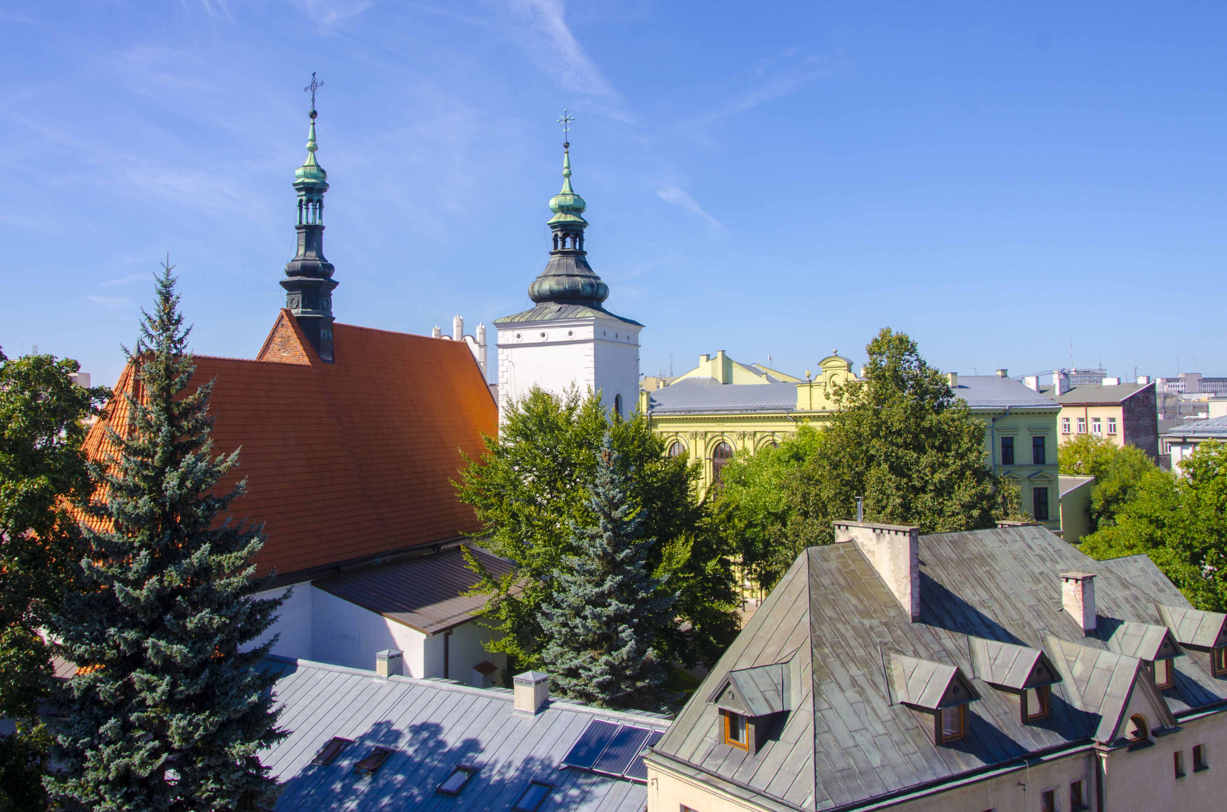 Lublin, klasztor, XV, XVII, XIX